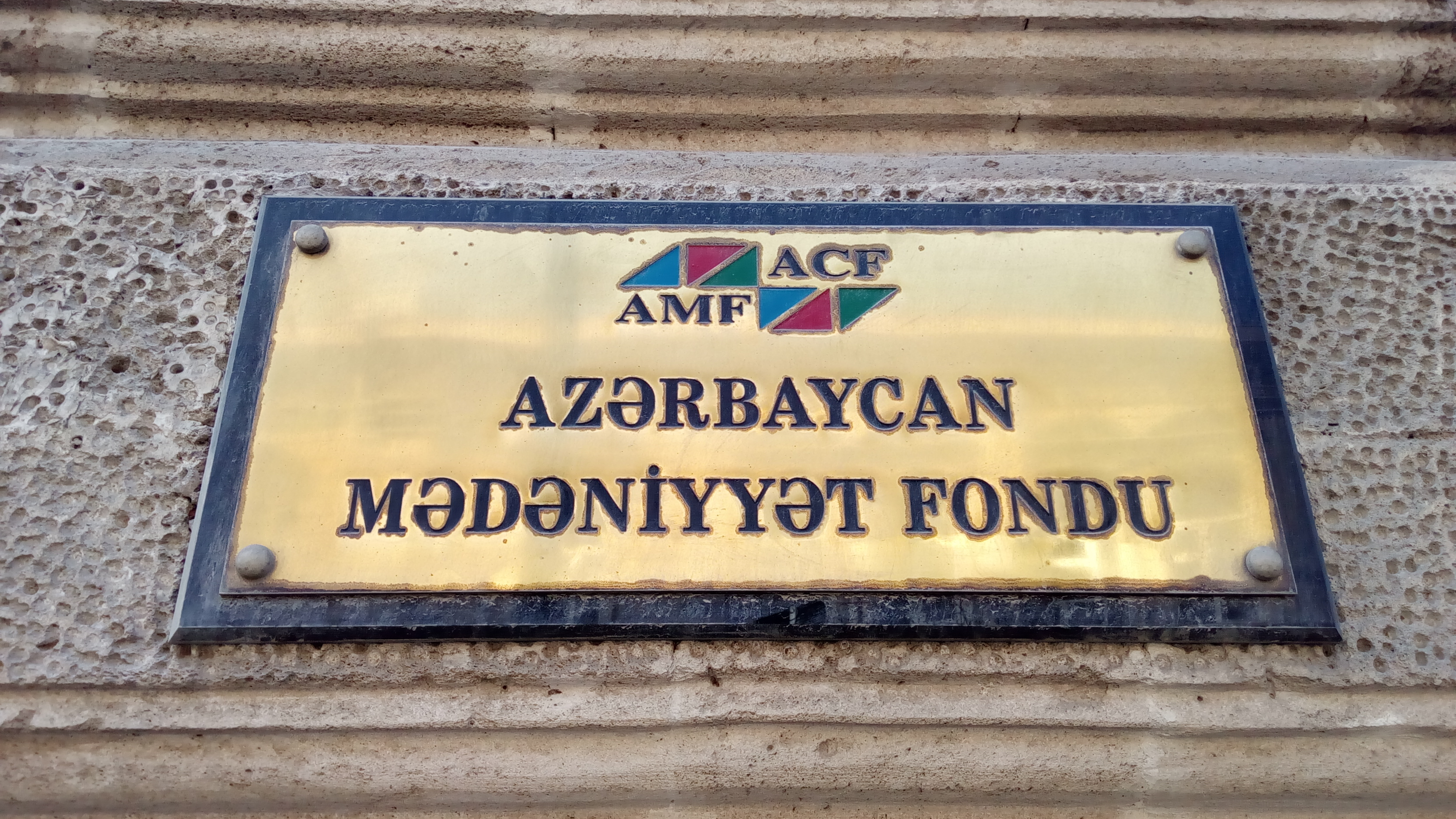 Azərbaycan Mədəniyyət Fondu